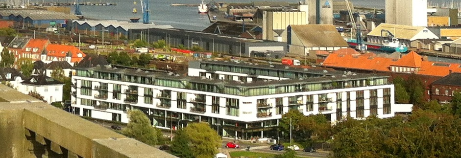 Udsigt fra Koldinghus over Kolding Bibliotek august 2014 - udsnit af